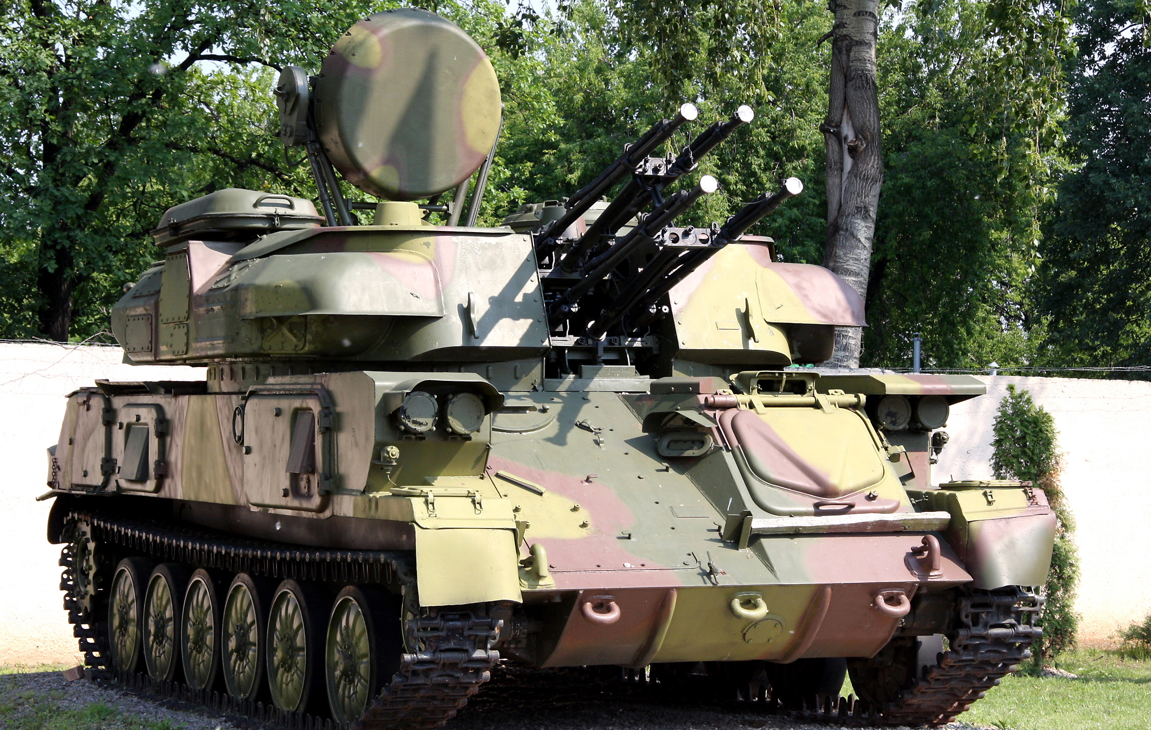 ЗСУ-23-4 «Шилка»